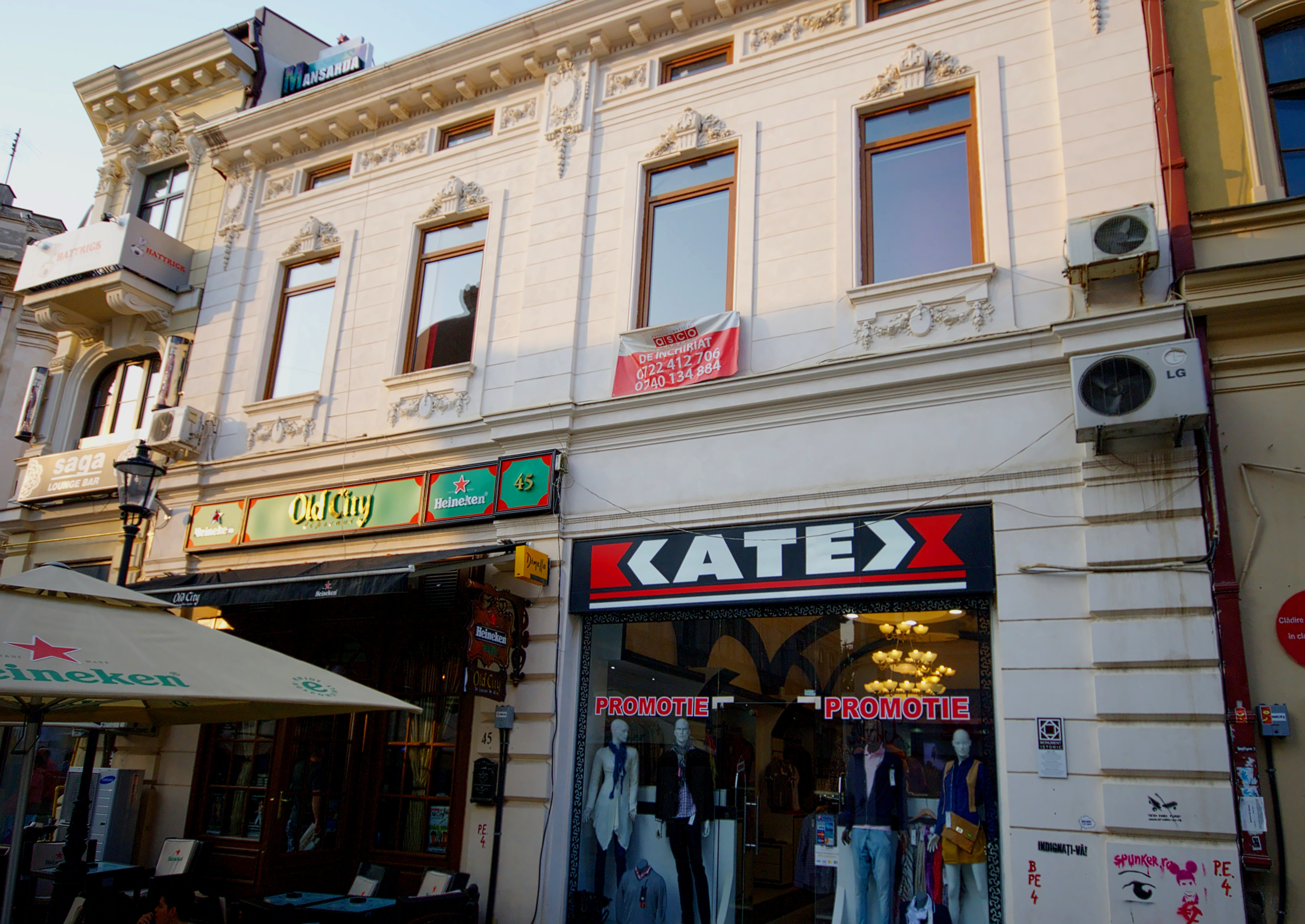 Casă cu prăvălie, Lipscani 45, 47